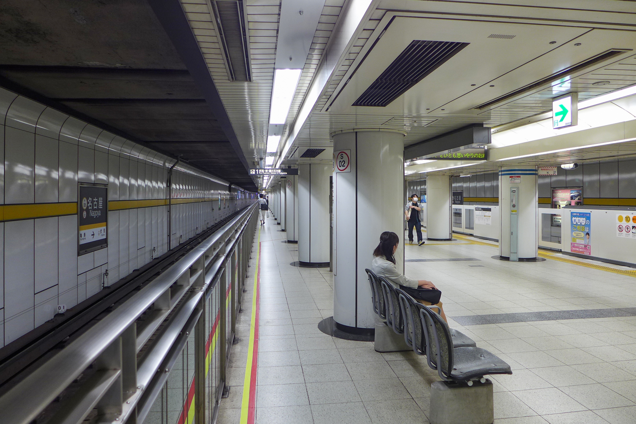 Nagoya Municipal Subway Nagoya Station Platform